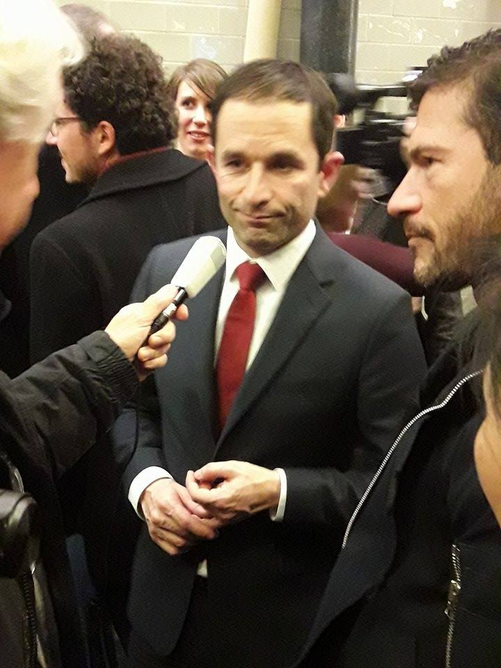 Benoit hamon interrogé par des journalistes le jour de l'inauguration de son siège de campagne le 11 février 2017 à Paris (48 rue du Chateau d'eau)